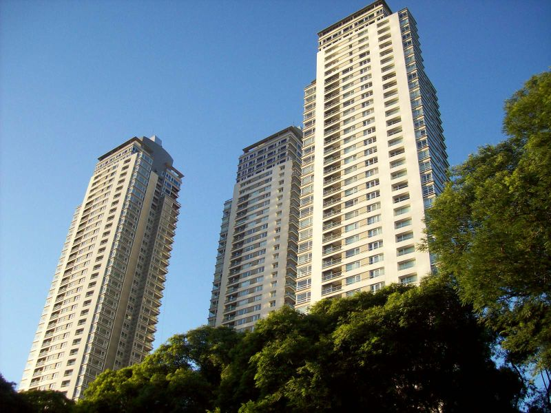 Le Parc Puerto Madero Towers. Puerto Madero, Buenos Aires, Argentina.